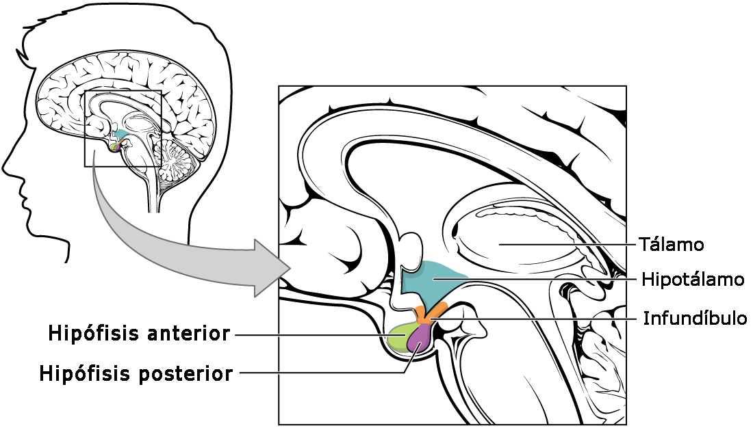 Ubicación del hipotálamo y su relación con la hipófisis anterior y posterior